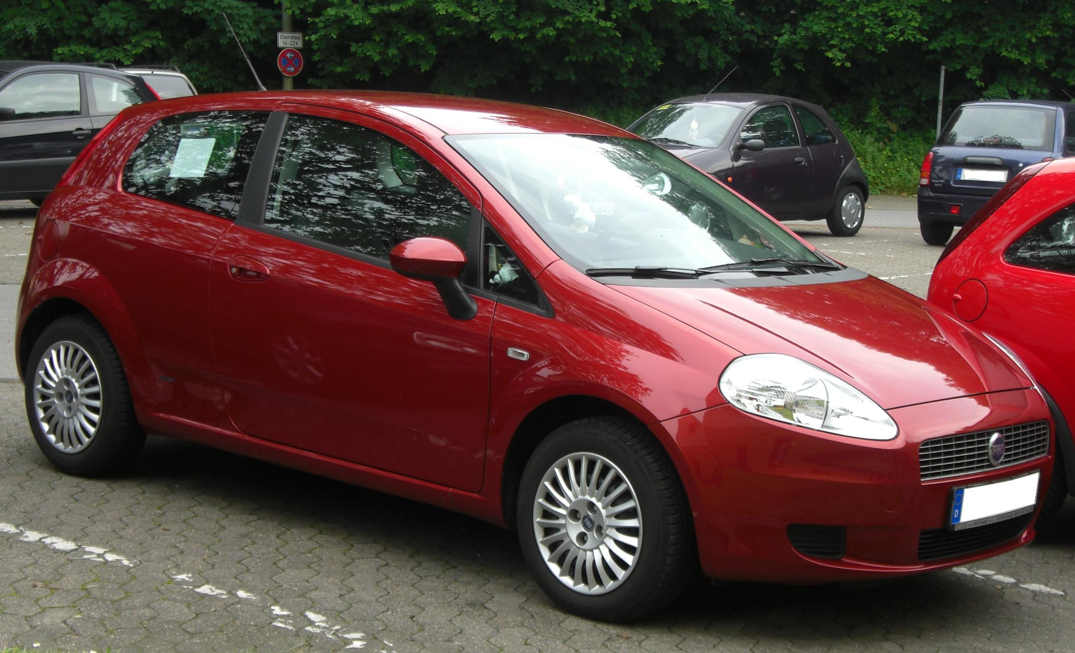 Fiat Grande Punto